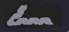 Patki Oficera ZS"S" RP